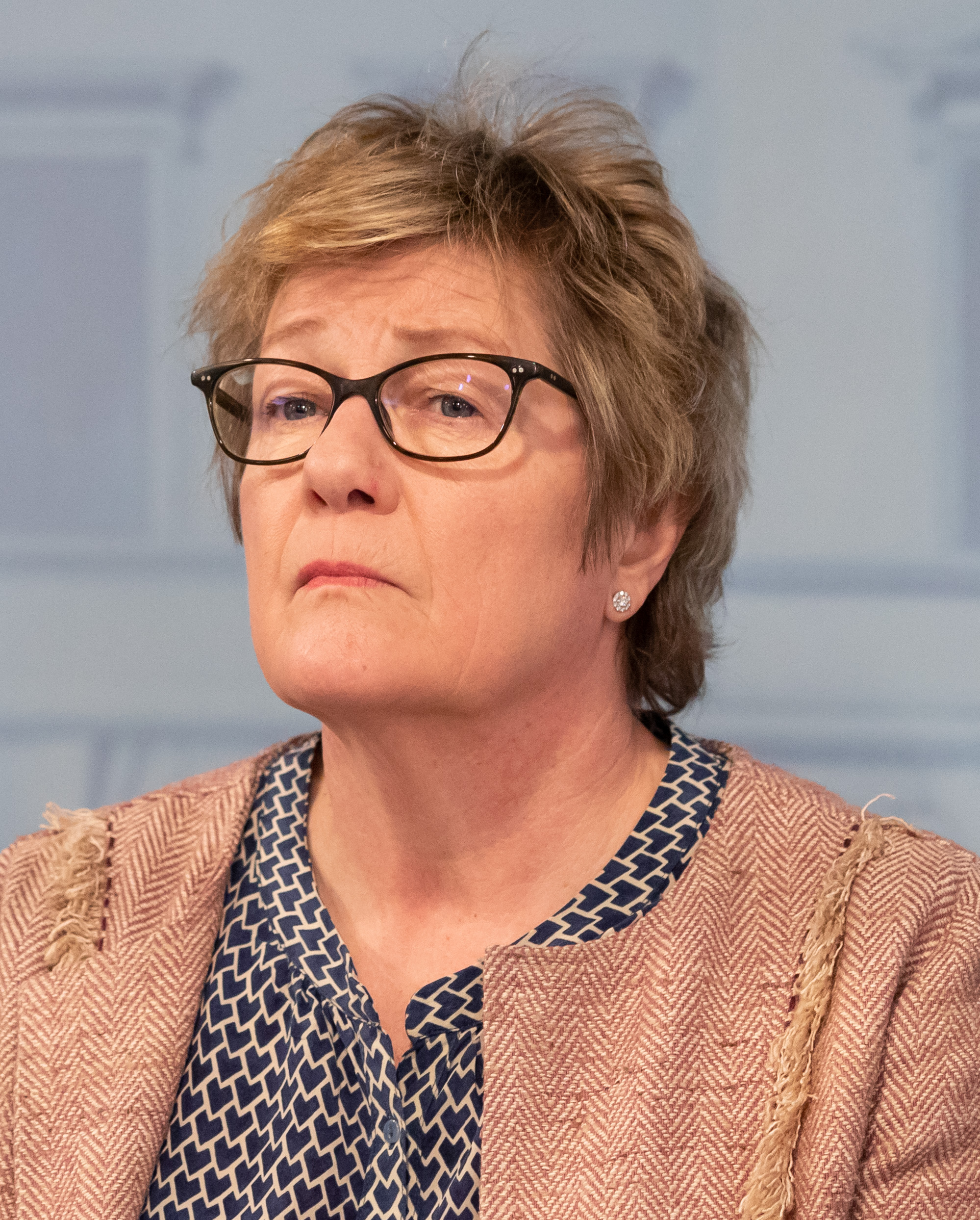 © Lauri Heikkinen | valtioneuvoston kanslia